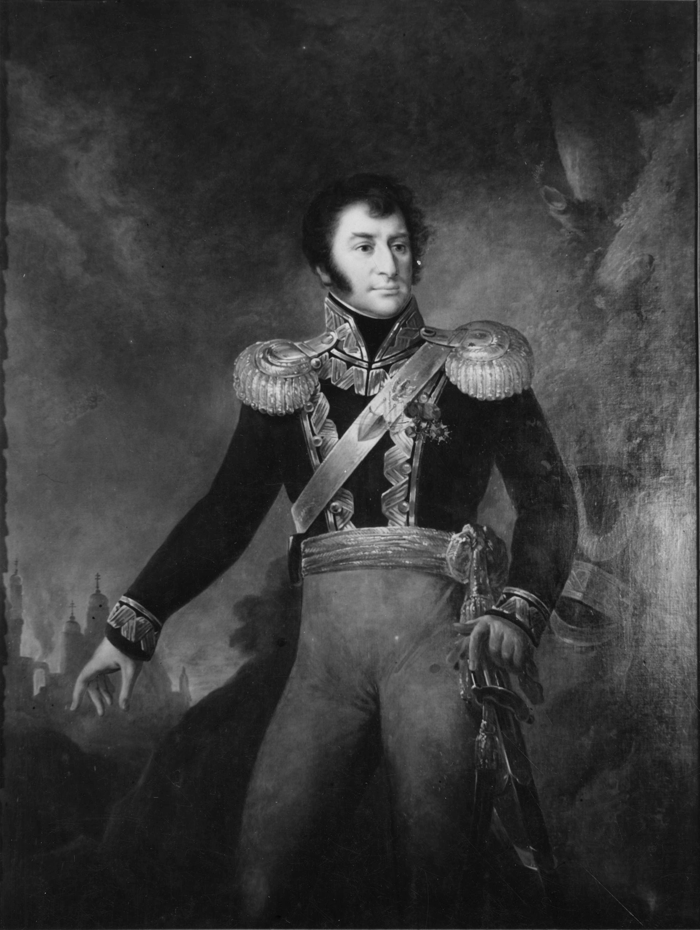 Беларуская (тарашкевіца): Надмагільле Тадэвуша Тышкевіча ў Парыжы